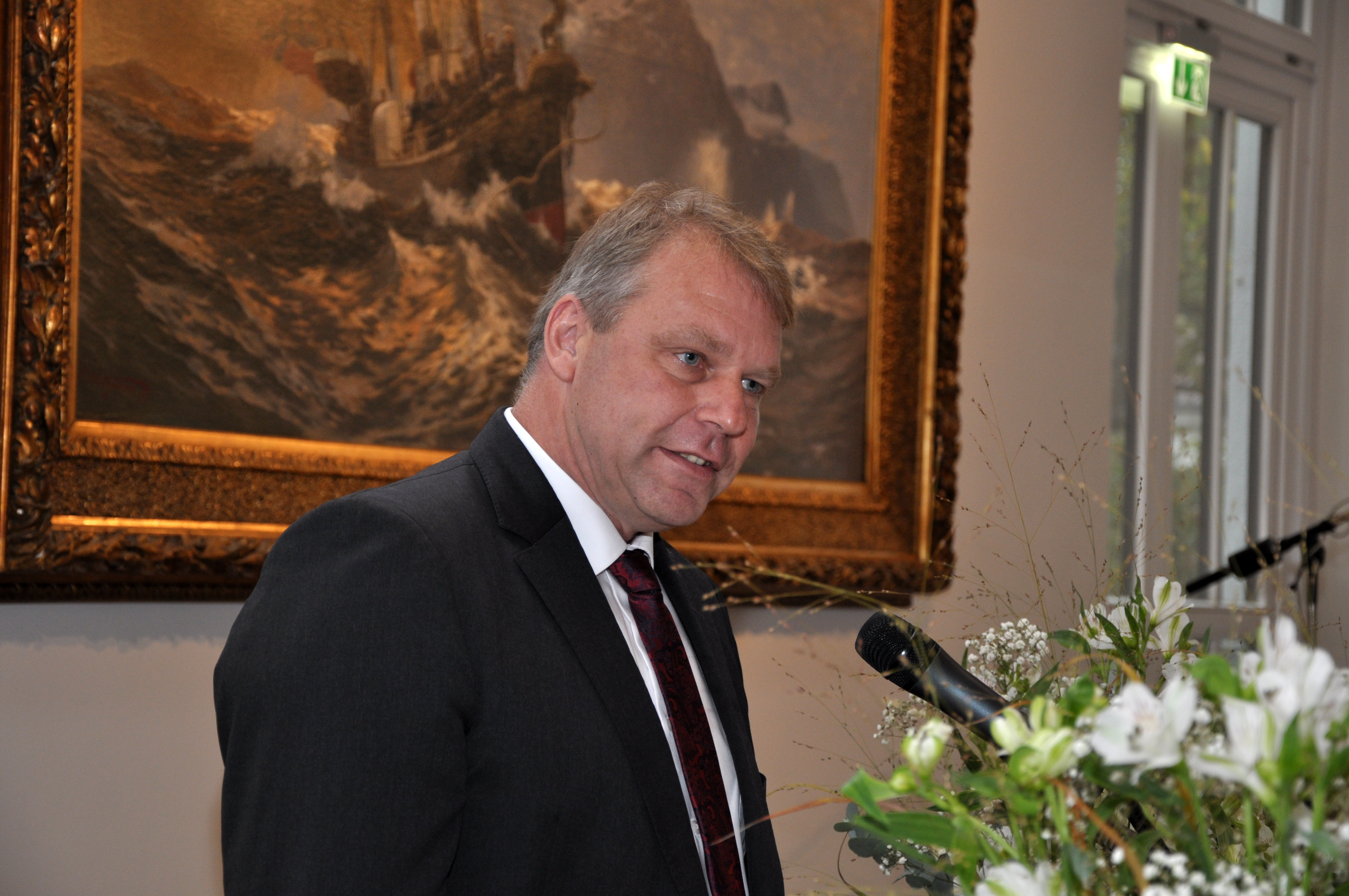 Der Physiker Lutz Kipp als Präsident der Christian-Albrechts-Universität zu Kiel bei einem Vortrag zum 350-jährigen Jubiläum der Christian-Albrechts-Universität im Kieler Yachtclub.